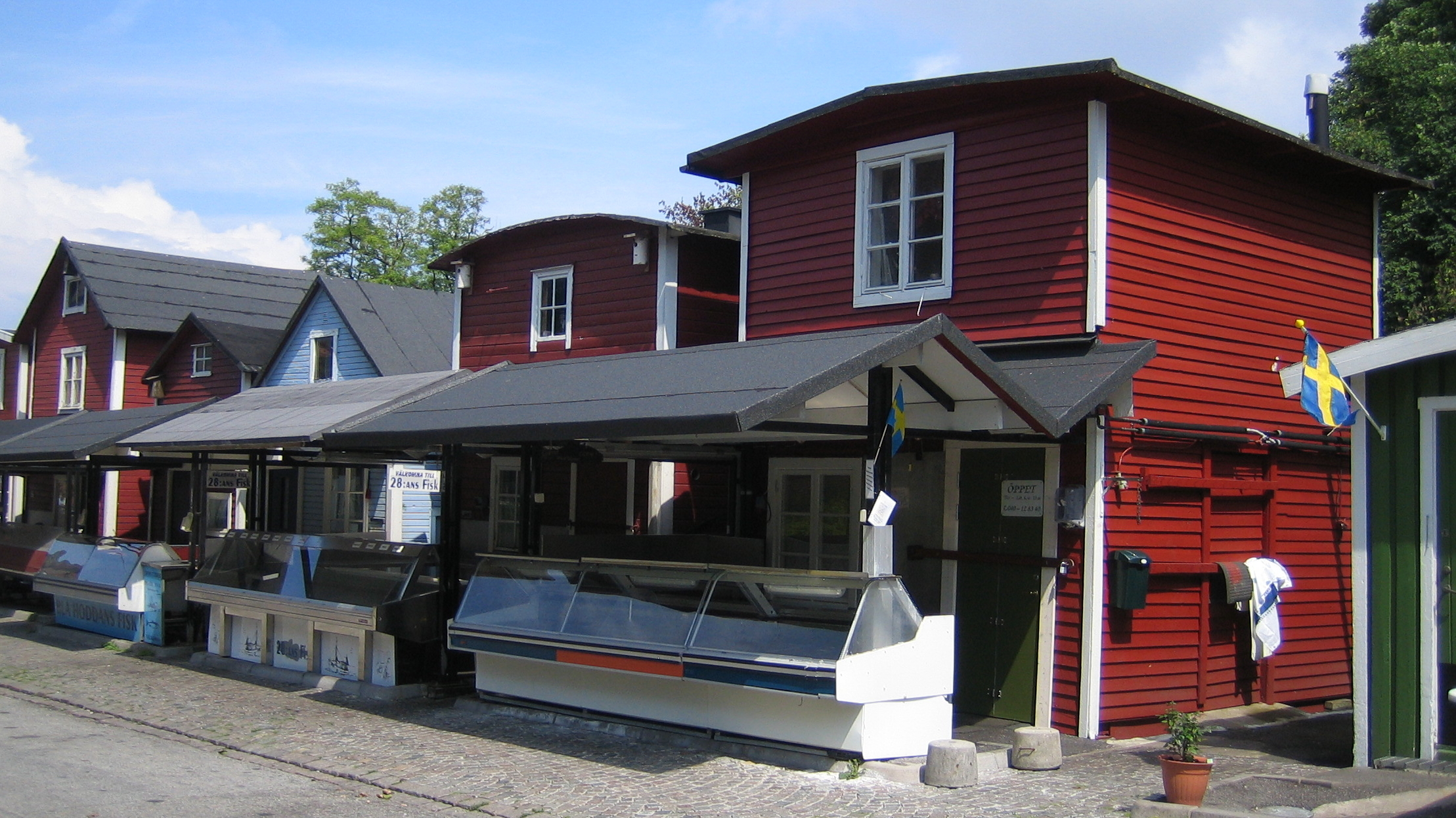 Fiskehoddorna, fishing sheds in Malmö